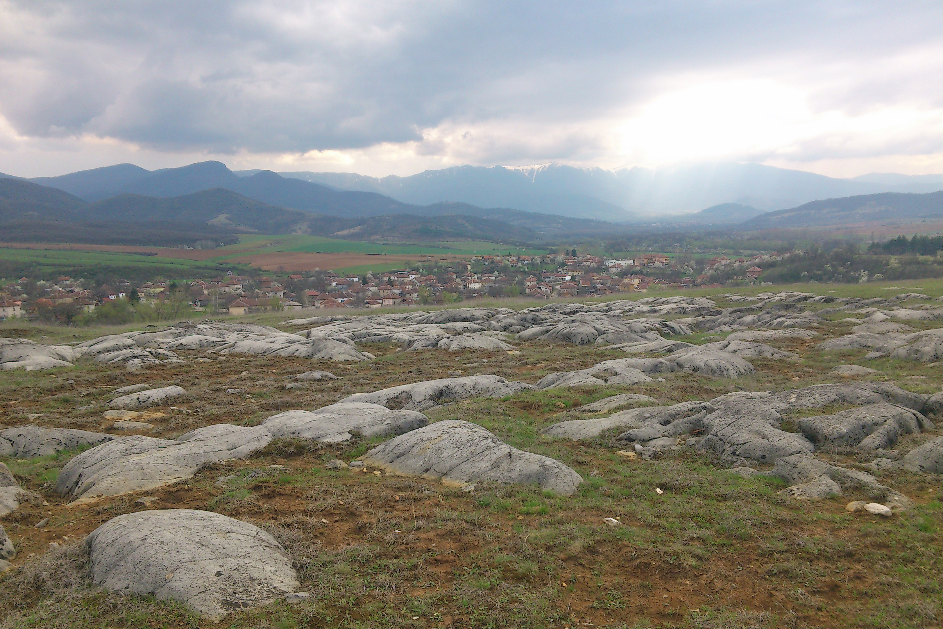 Врачански Балкан